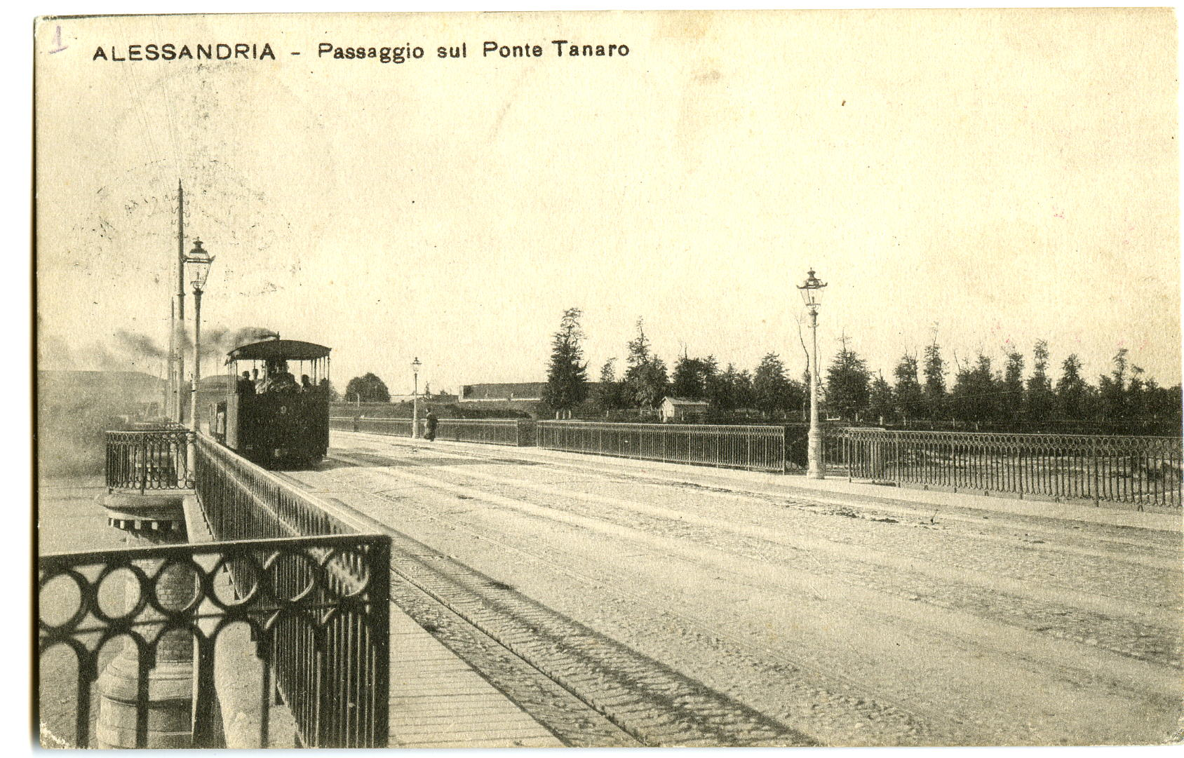 Collezione di Tony Frisina - Alessandria